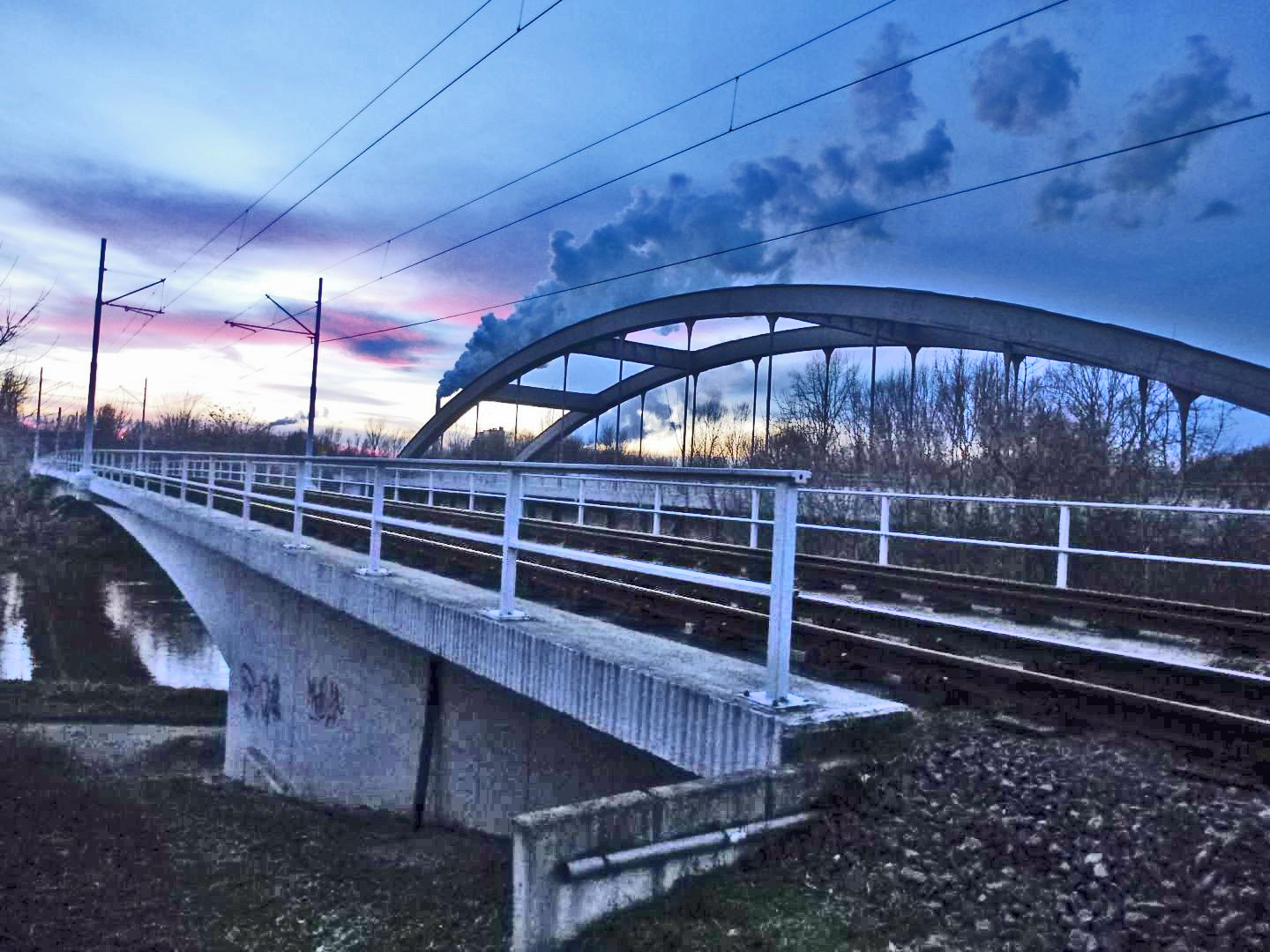 Brücke der B91 und der Straßenbahn über die Saale bei Schkopau